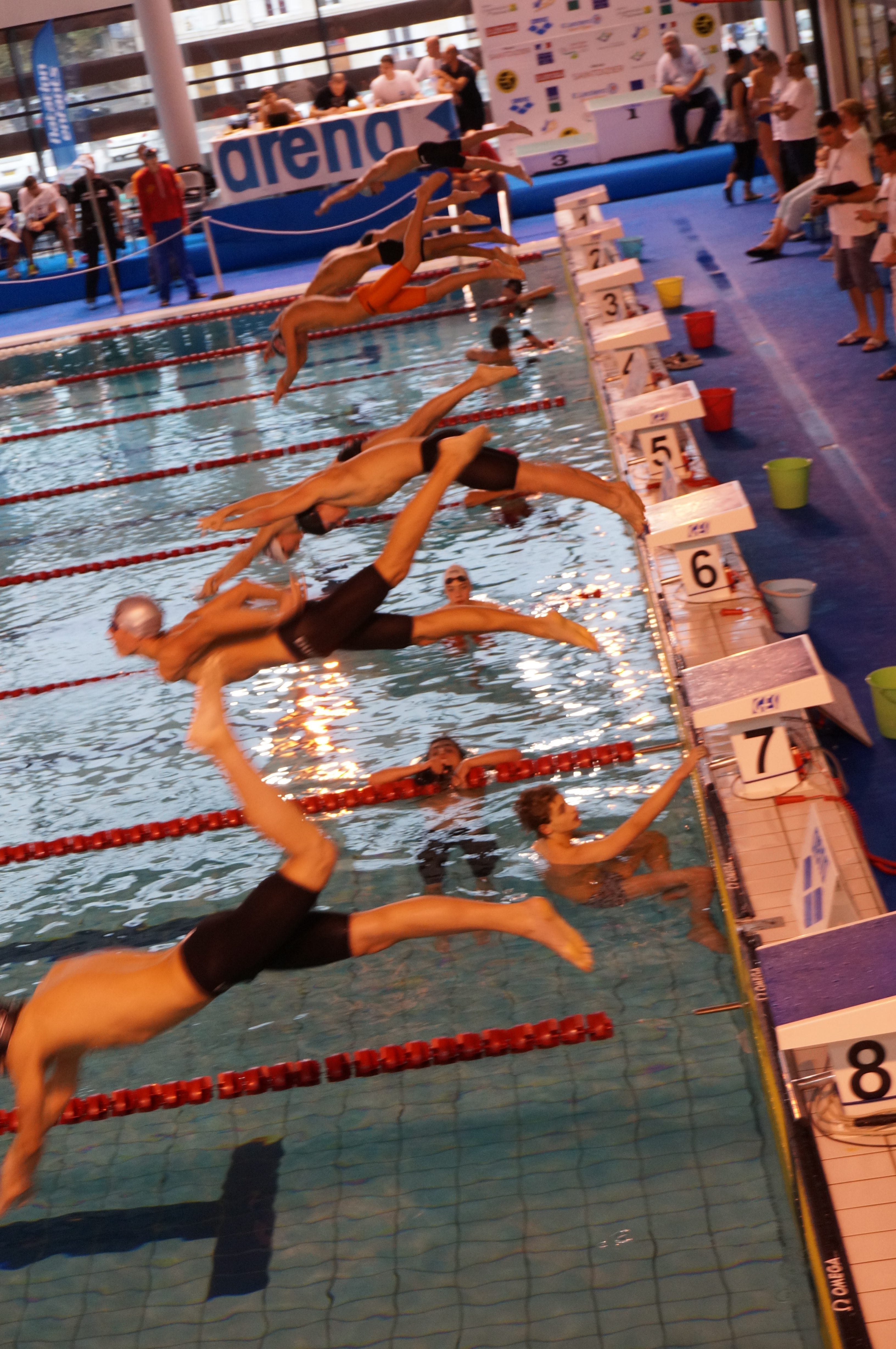 XXIIe compétition internationale de st-Dizier 2013, qualifications de brasse messieurs.